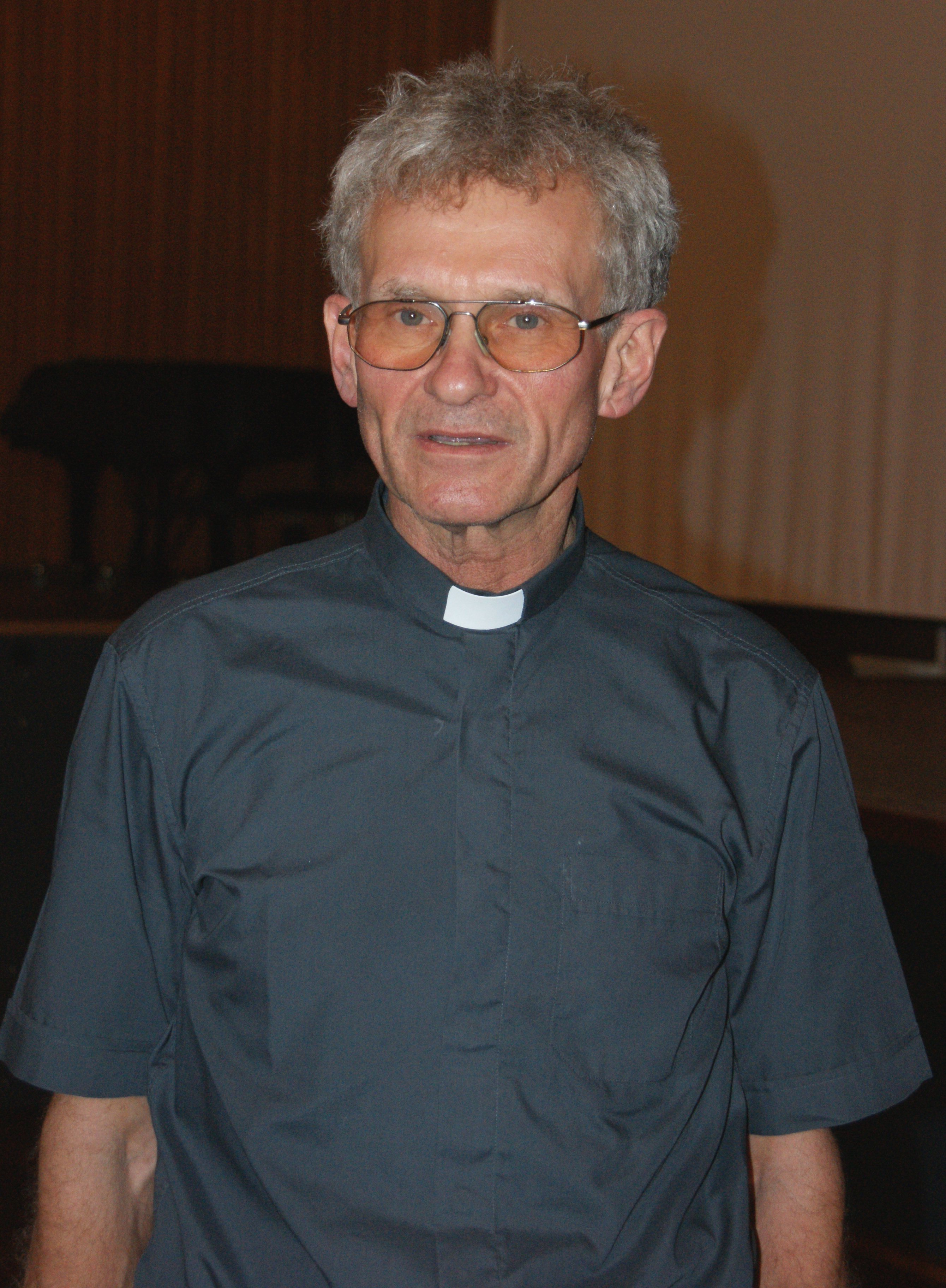 Franz Meurer, visit at the CJD Christophorusschule Königswinter